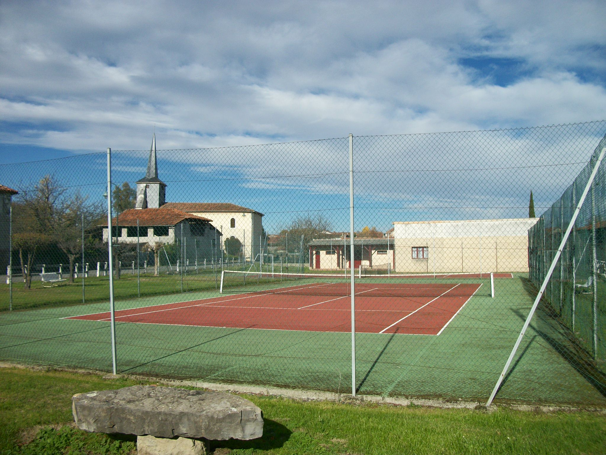 Terrain de tennis à Ausson